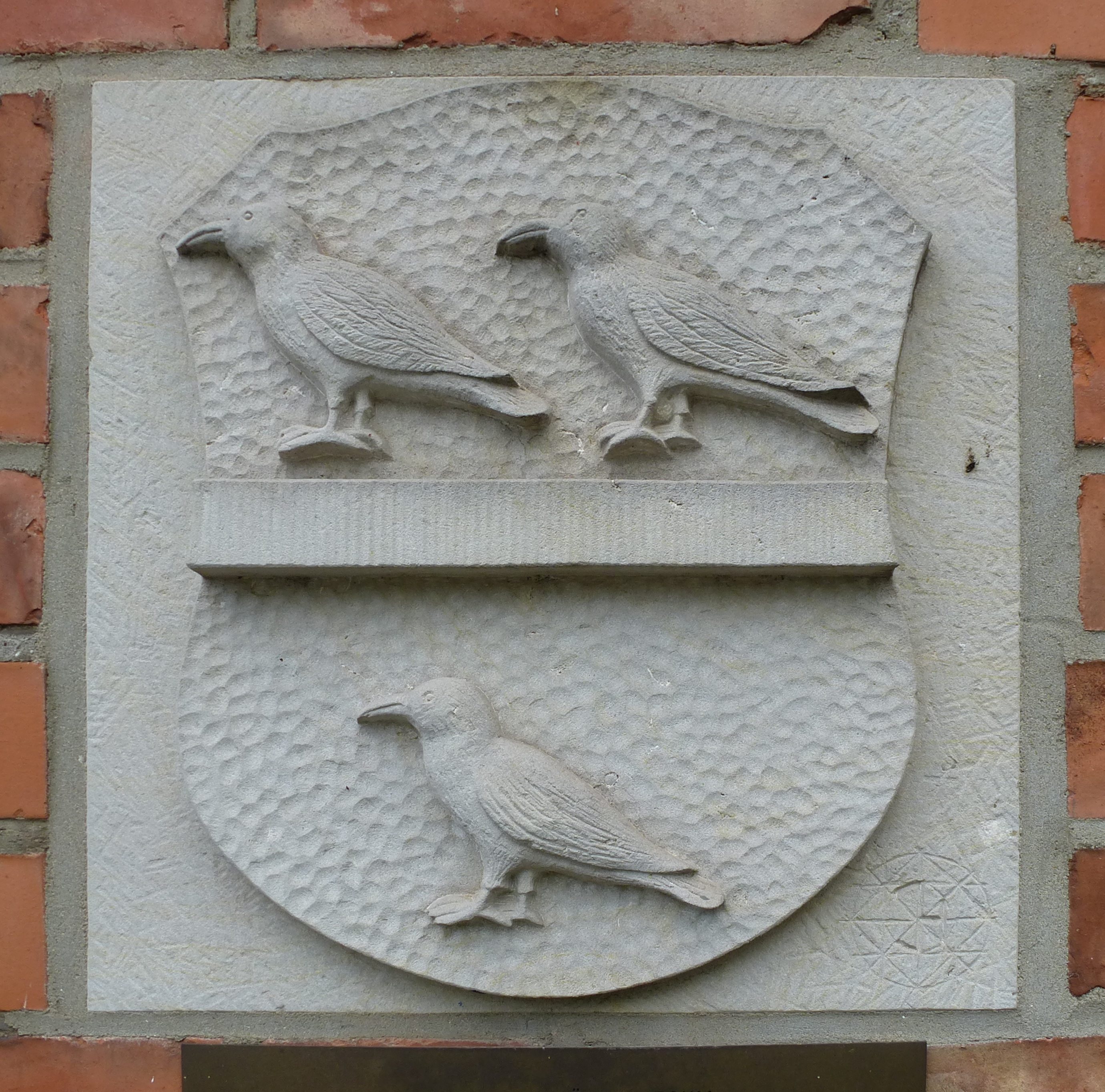 Wappenstein von Jürgen Hinrichs (Bremen-Lesum) am Lesumer Polizeihaus. Wappen der Börde Lesum, Gerichtssiegel 1. Hälfte 19. Jahrhundert.